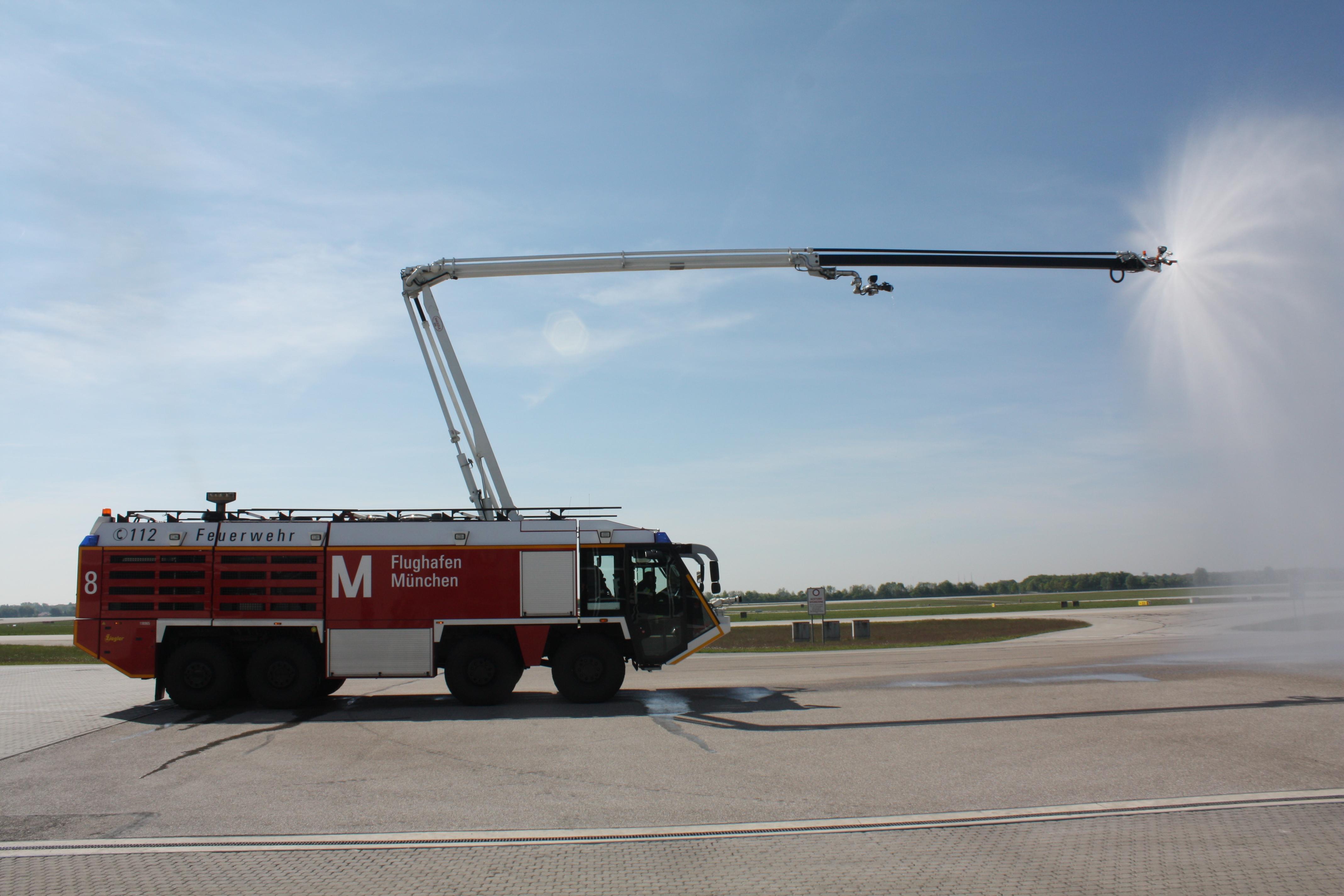 Flugfeldlöschfahrzeug Ziegler Z8, Flughafen München. Sprühdüse am Ausleger im Einsatz.